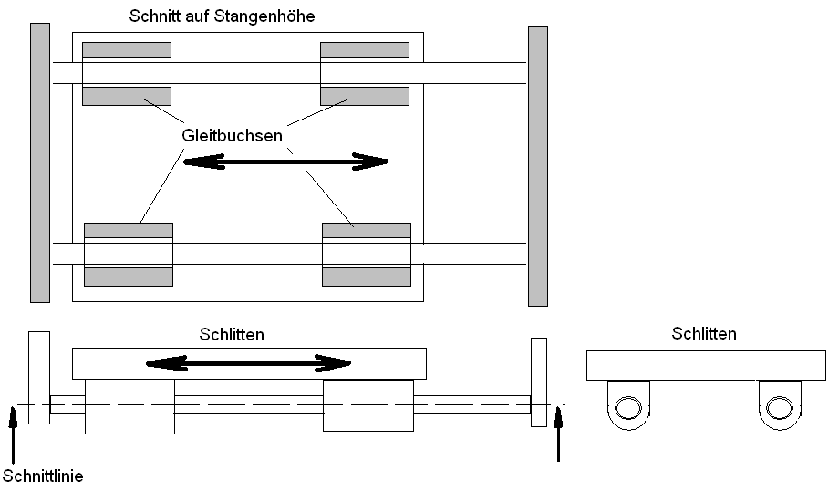 Skizze eines Maschinen-Schlittens mit Gleitbuchsen.